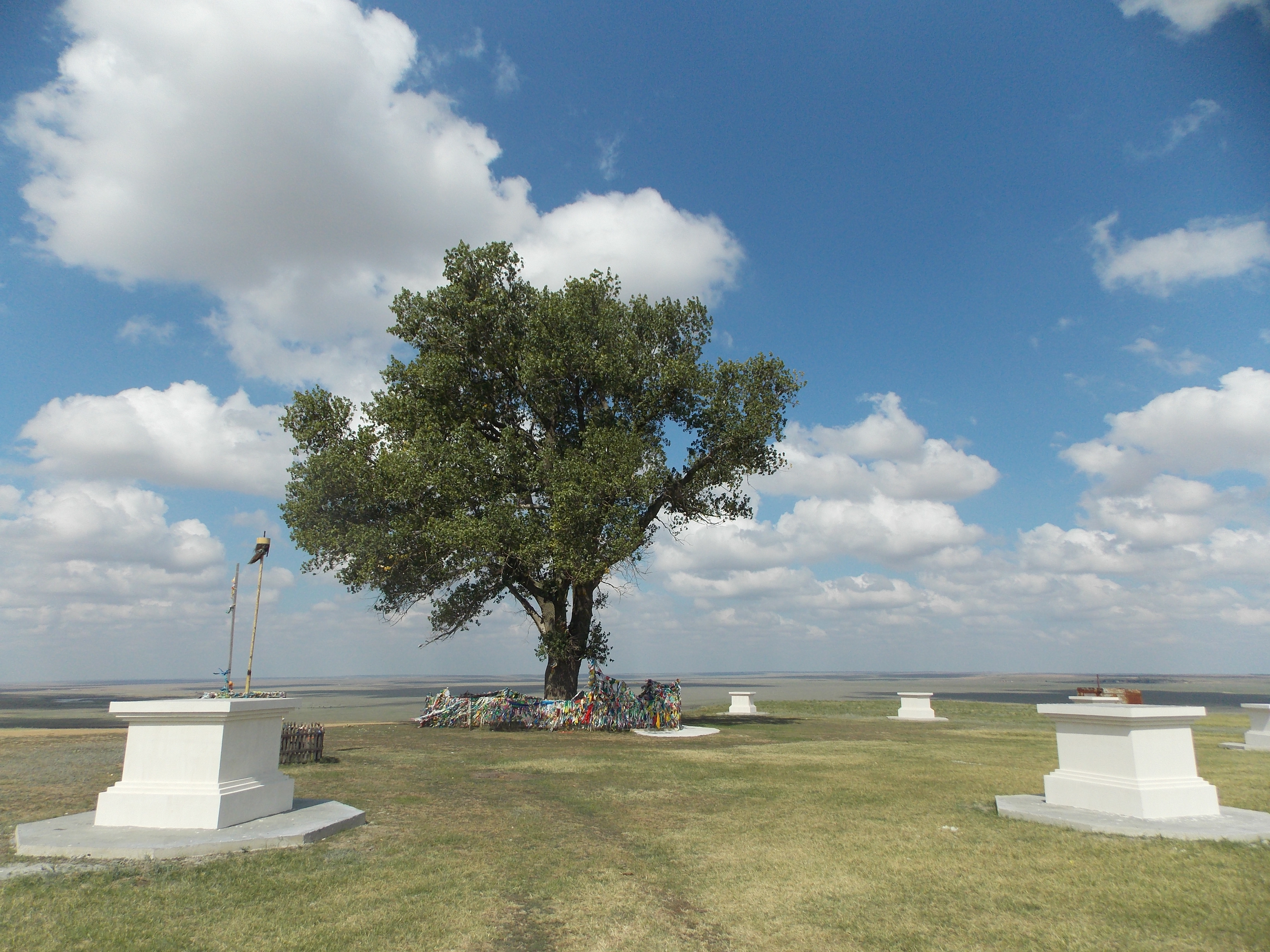 Одинокий тополь, Калмыкия